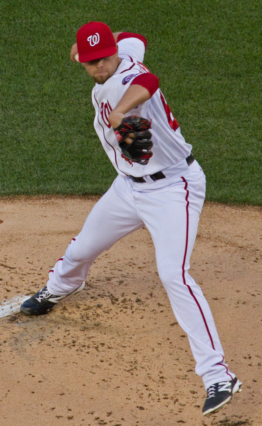 Blake Treinen